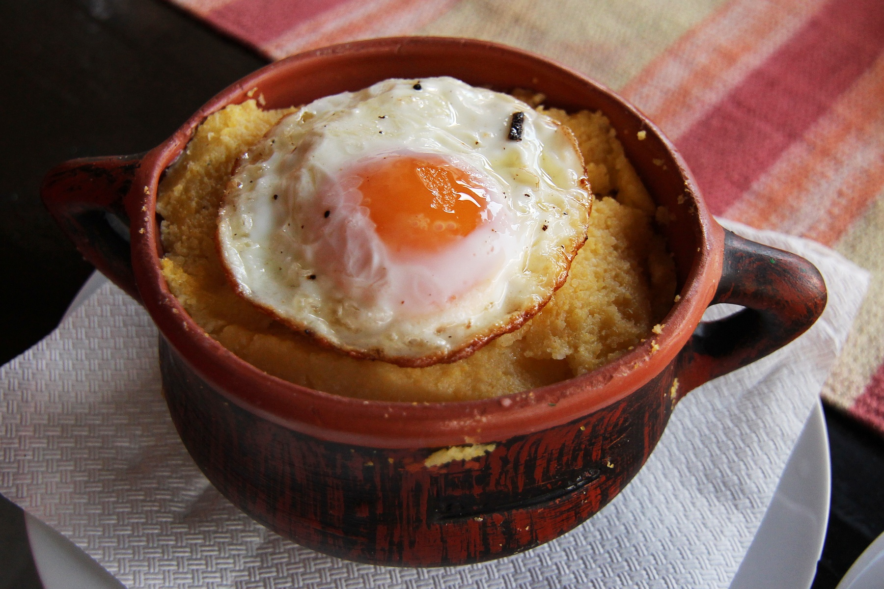 Bulz ciobănesc cu ou